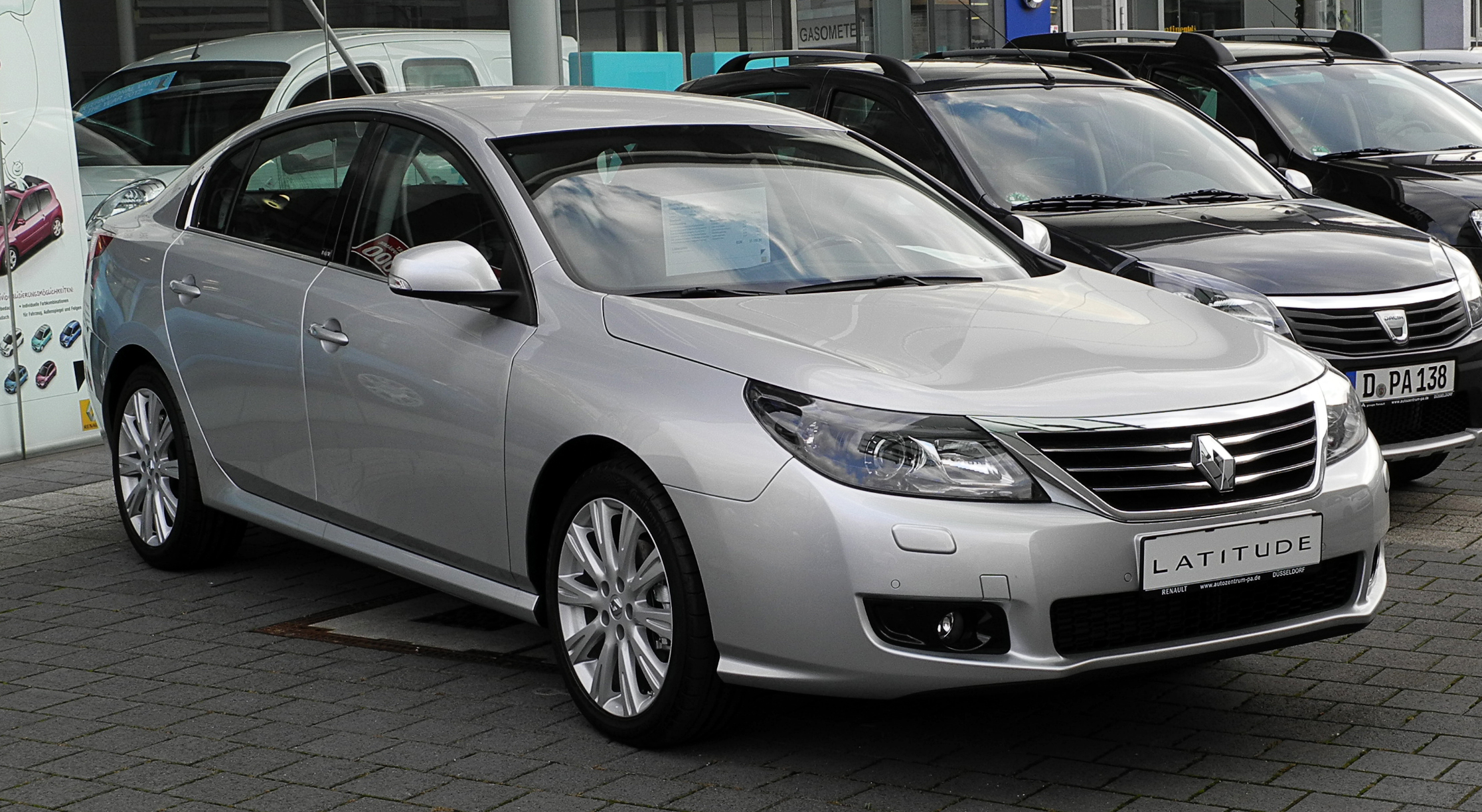 Renault Latitude Initiale dCi 175 FAP Automatik